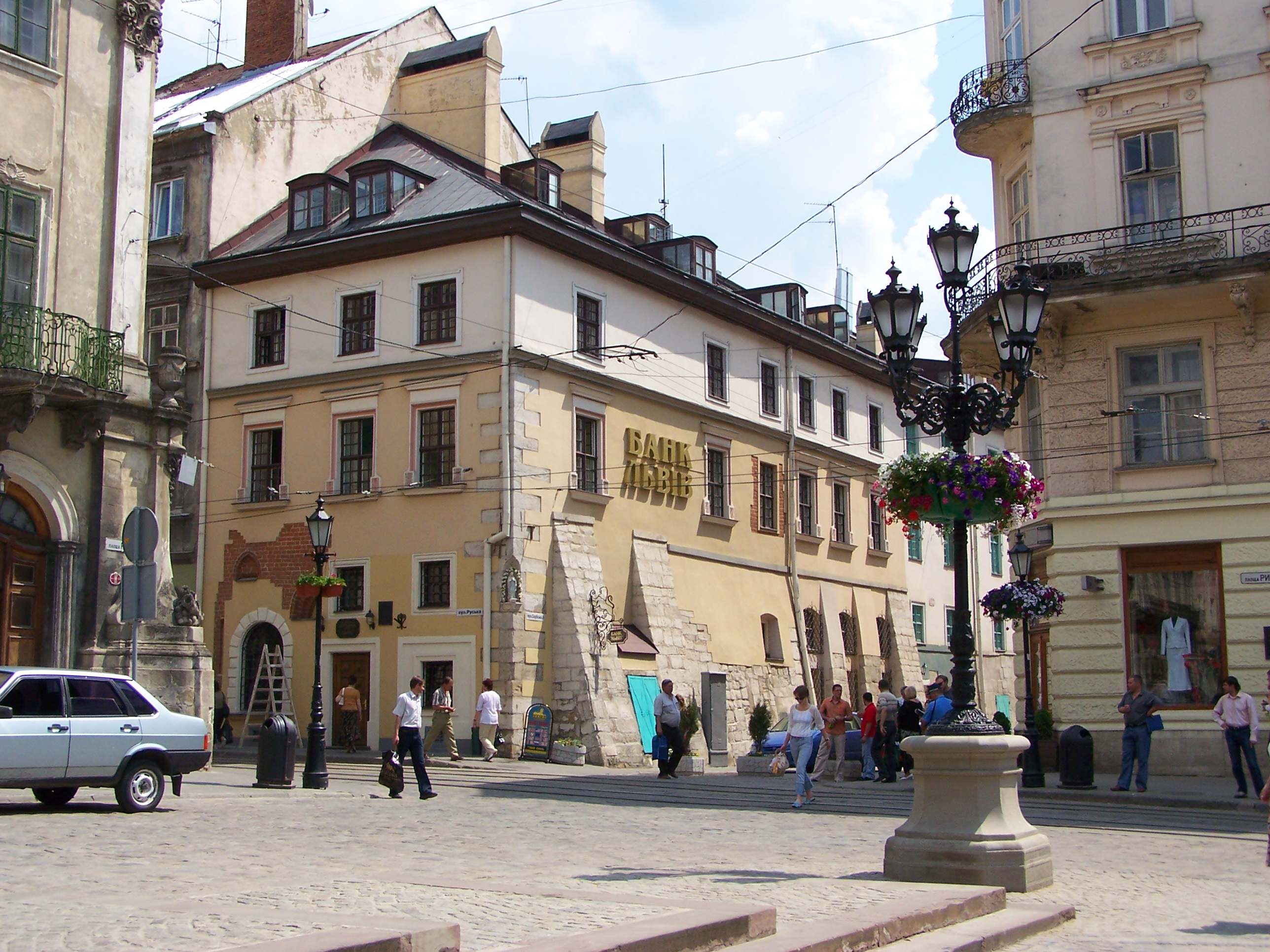 Kamienica przy rynku we Lwowie (Ukraina).